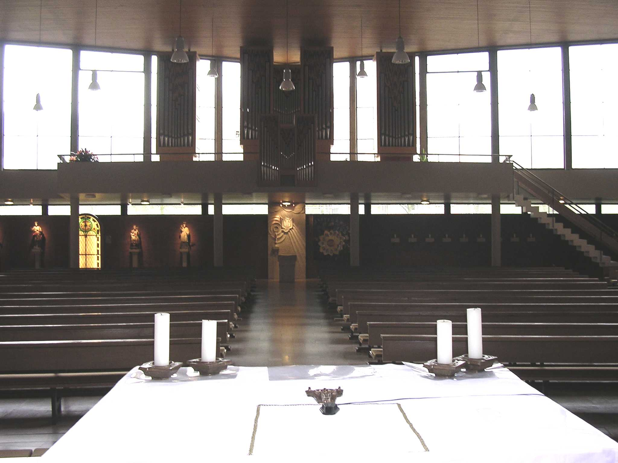 St. Matthäus (Aschaffenburg) - Gailbach Orgel